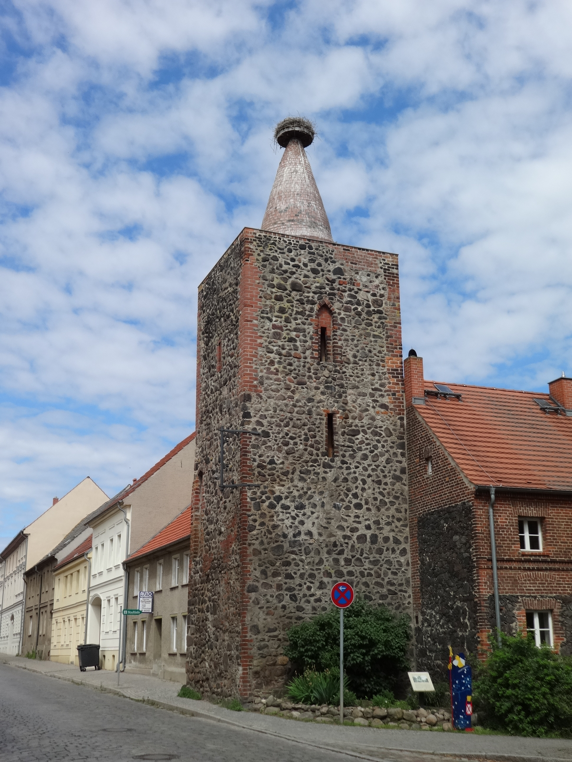 Strausberger Tor, Teil der mittelalterlichen Stadtbefestigung von Altlandsberg, eine Stadt im Landkreis Märkisch-Oderland, Brandenburg